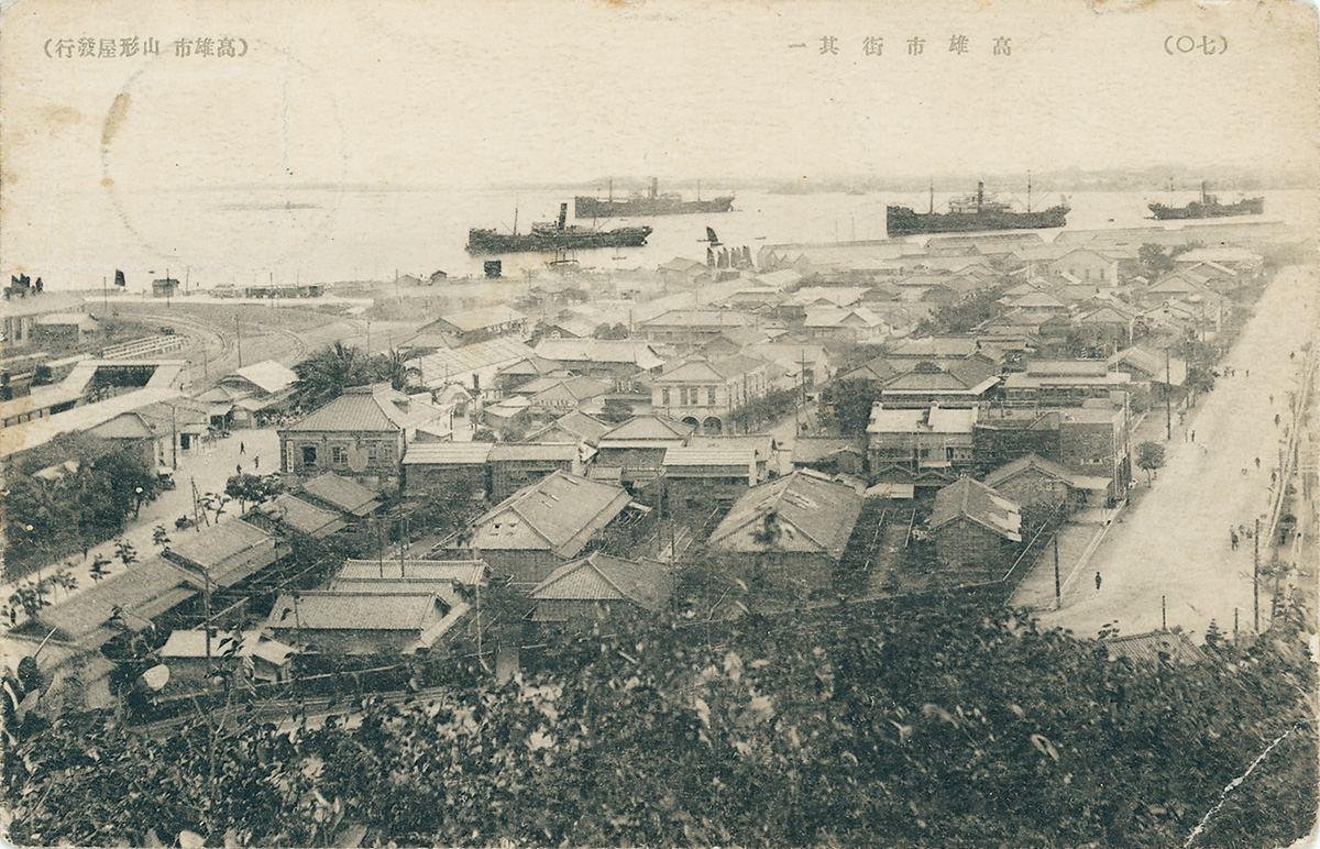 中文（台灣）: 高雄市街其一